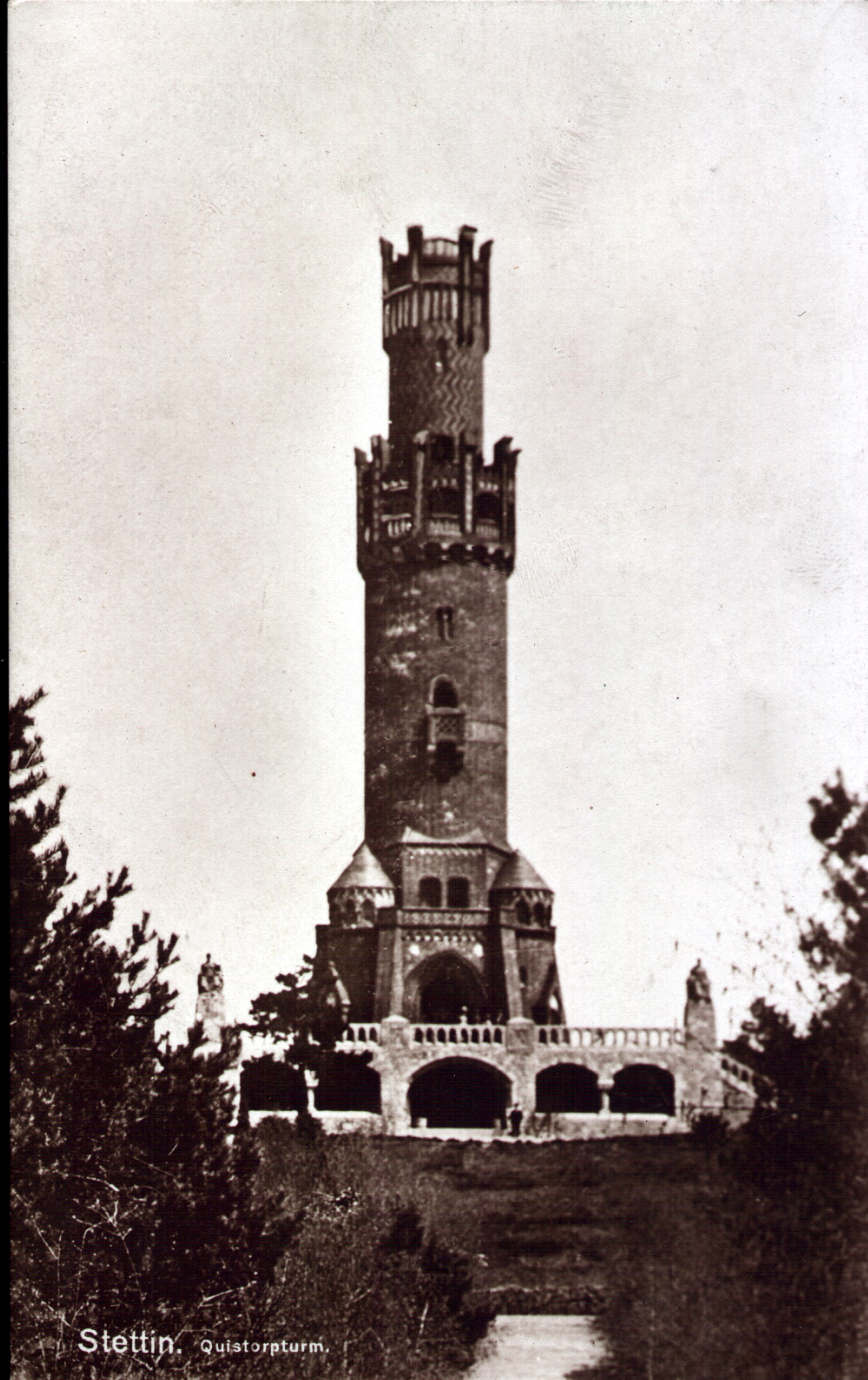 Szczecin na starej fotografii